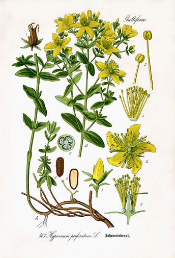 Adi dazı. (O.V.Tomenin «Flora von Deutschland, Österreich und der Schweiz» kitabından illüstrasiya, 1885).